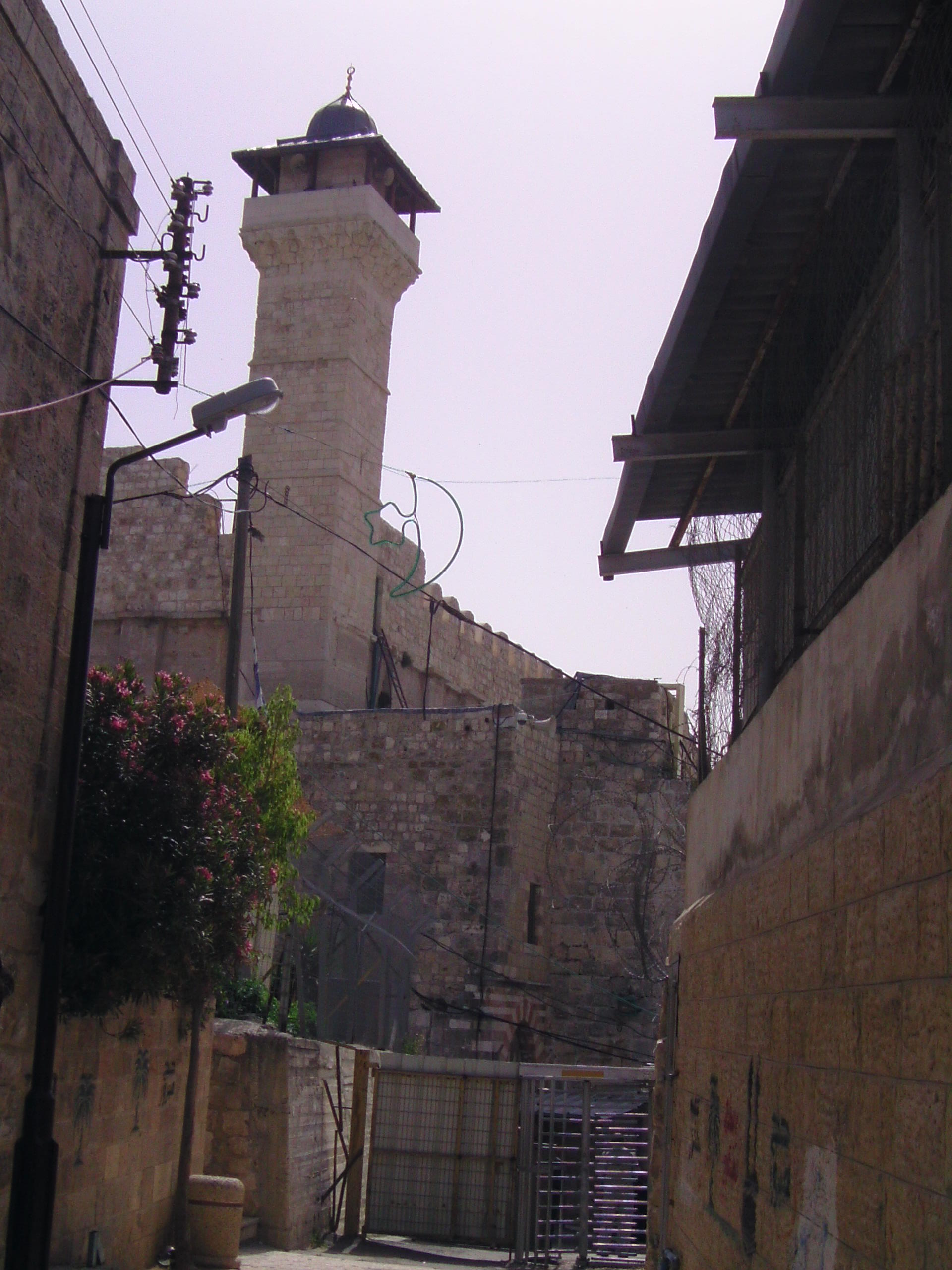 Tombeau d'Abraham